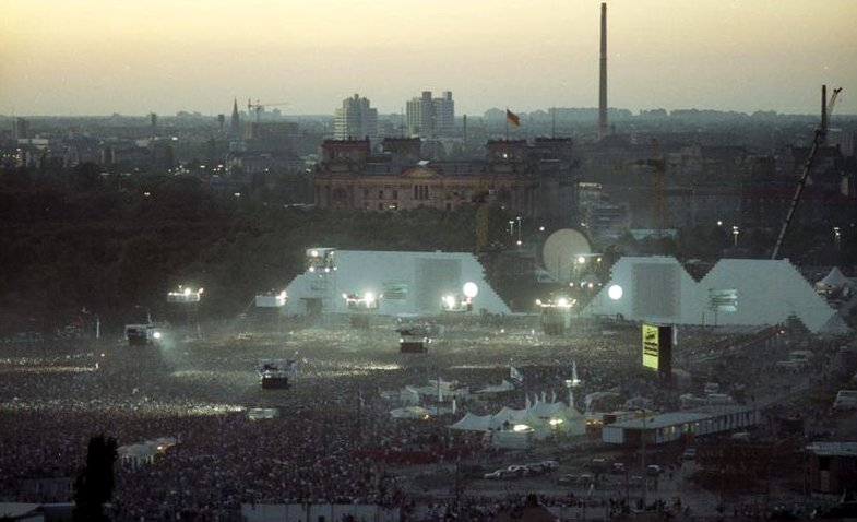 Berlin, Aufführung der Rockoper "The Wall" BER-402/ KB/22.7.90/Berlin: Rockspektakel "The Wall"/ Rund 300 000 Zuschauer aus ganz Europa und Übersee waren auf den ehemaligen "Todesstreifen" zwischen Brandenburger Tor und Leipziger Platz gekommen, um die Neuinszenierung der Rockoper "The Wall" von Ex-"Pink-Floyd" Chef Roger Waters zu erleben. Das gigantische Happening war zugleich Auftakt einer weltweiten Spendenaktion des World War Memorial Found for Disaster Relief (Fond für Katastrophenopfer). Die Show auf dem Potsdamer Platz in der Nacht vom 21. zum 22. Juli wurde vom Fernsehen live in alle Welt gestrahlt. [Berlin, Potsdamer Platz.- Aufführung der Rockoper "The Wall" auf dem ehemaligen Todesstreifen]